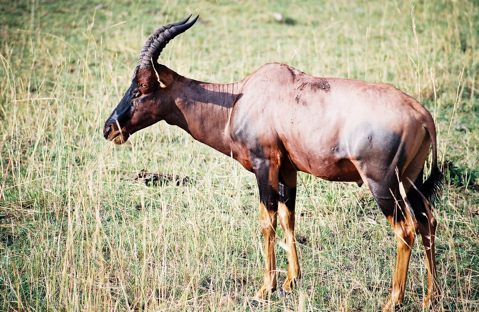 Damaliscus lunatus African Topi standing in Masai Mara, Kenya